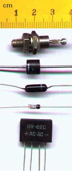 several semiconductor diodes